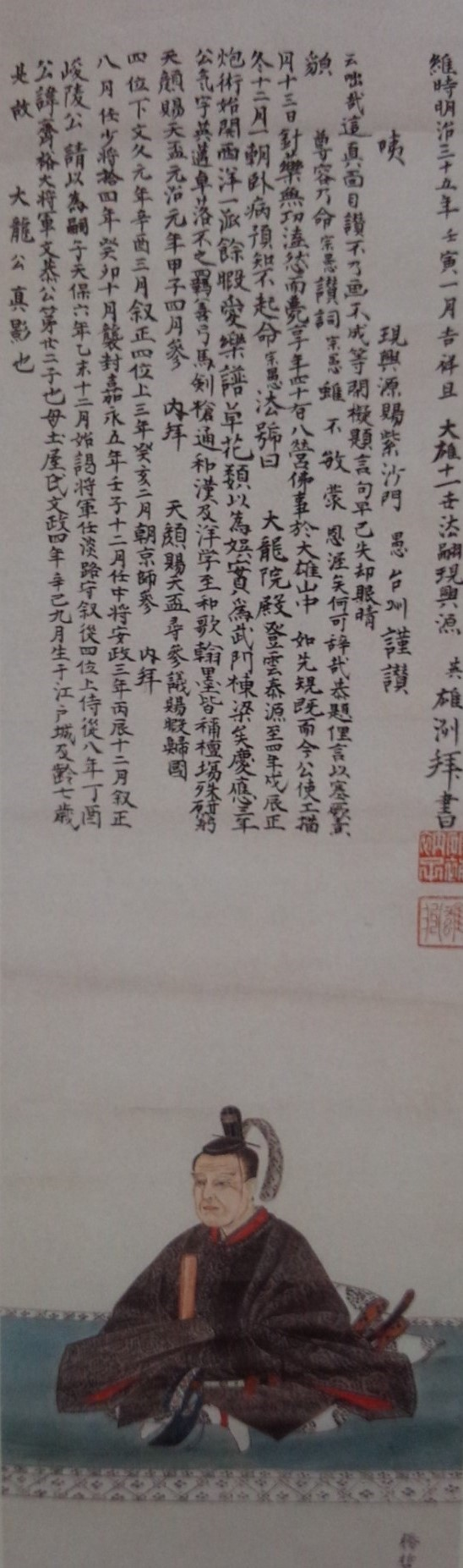 蜂須賀斉裕の肖像(全体)。